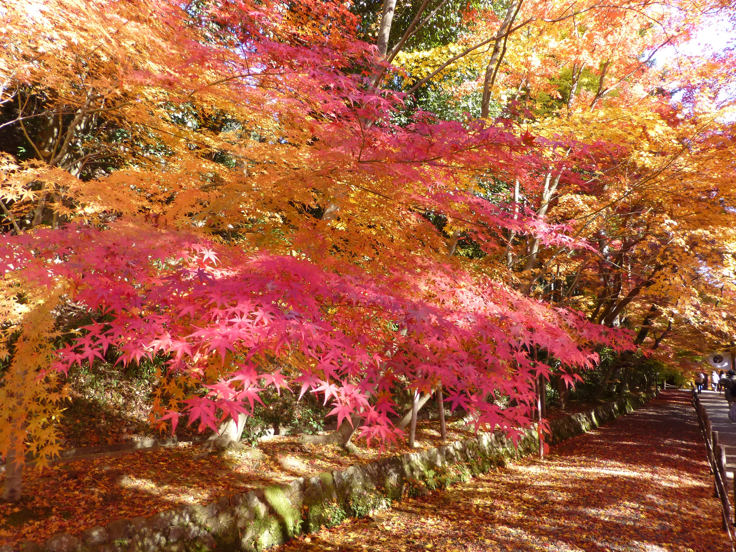 長岡京市光明寺もみじ祭り３